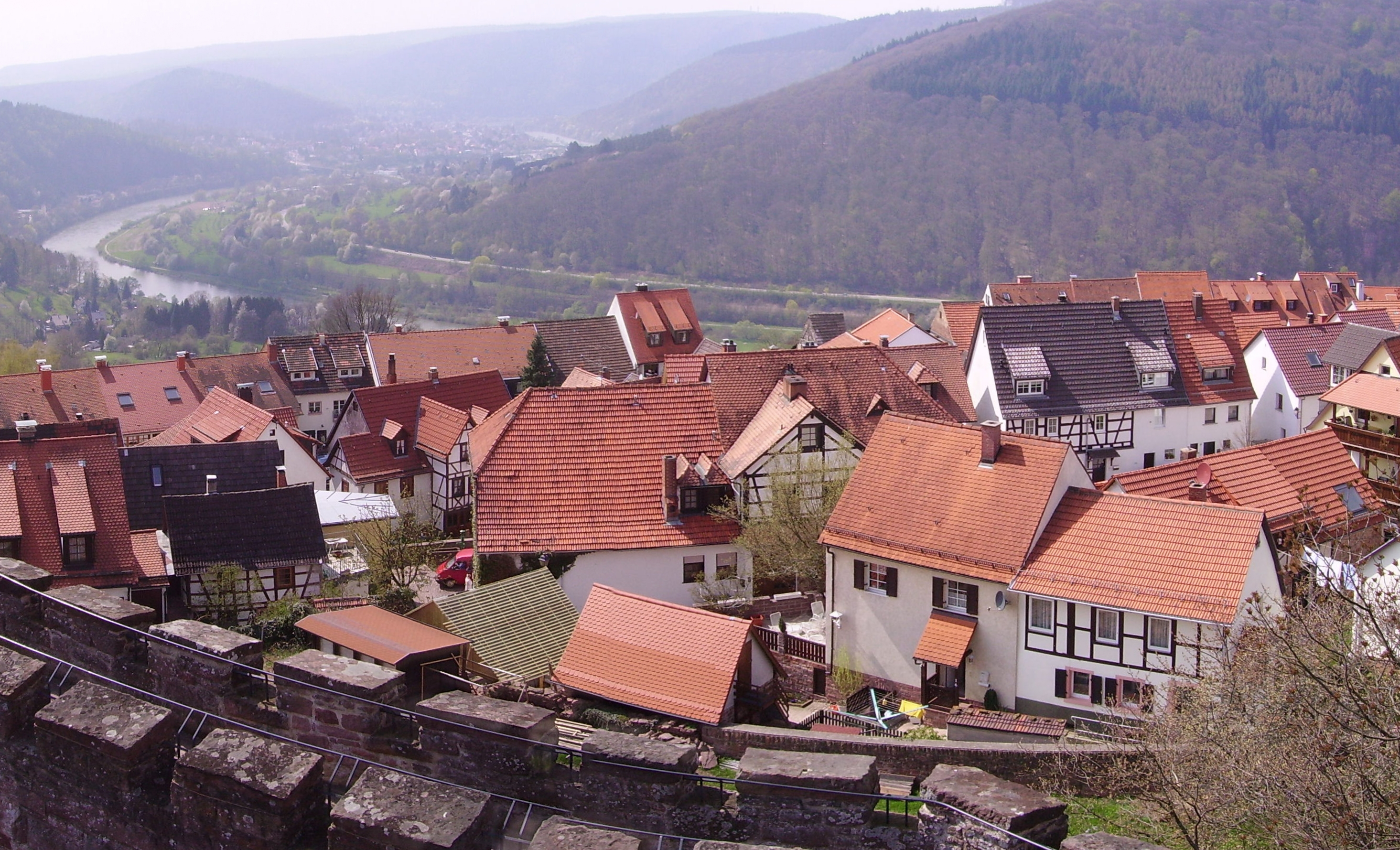 Neckargemünd Germany